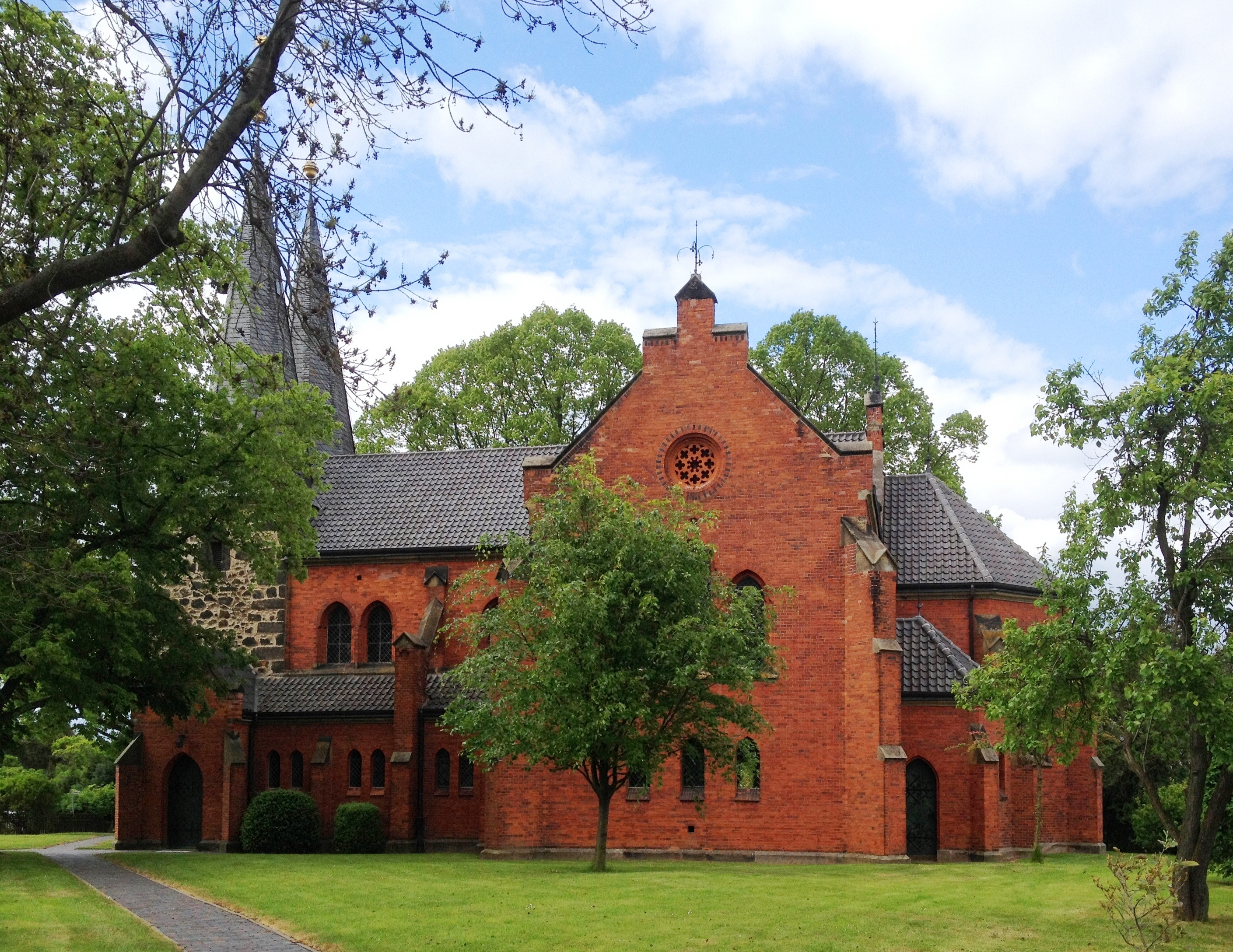 Liebenburg, ev.-luth. Kirche St. Trinitatis